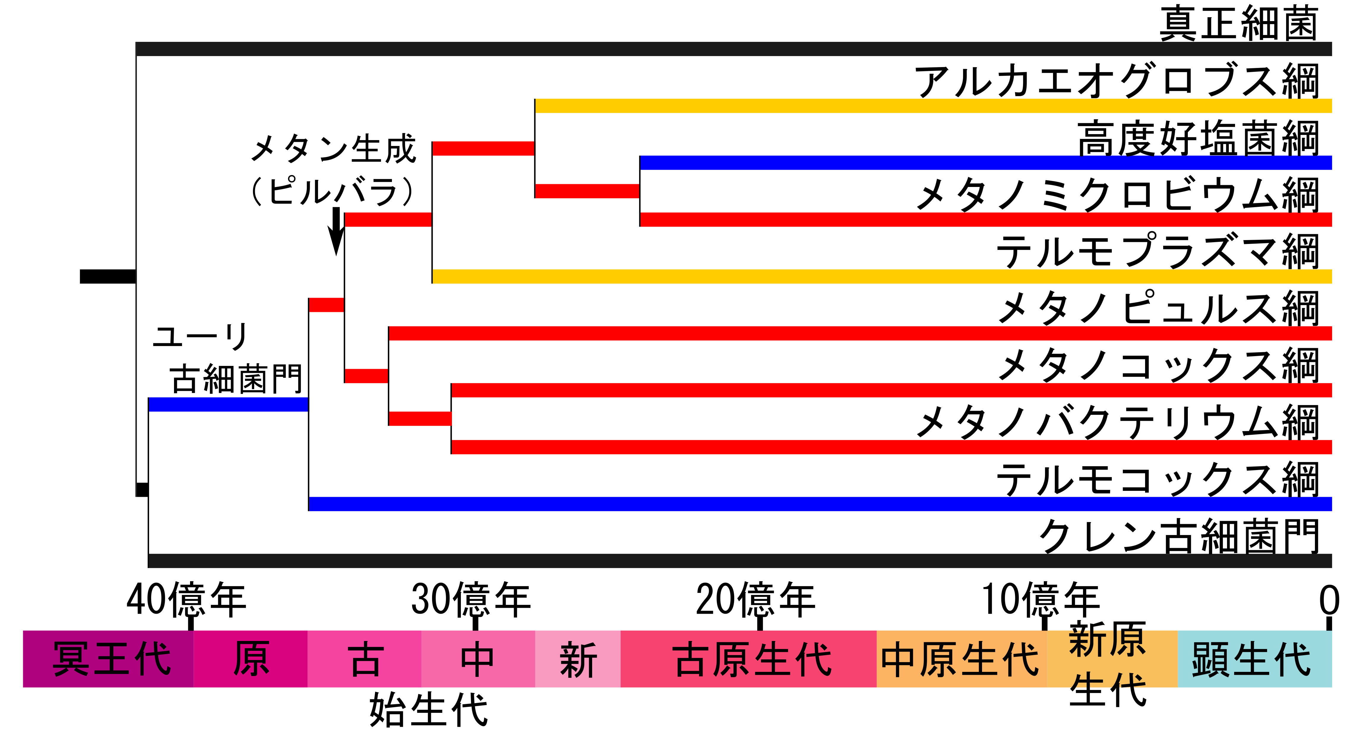 The TimeTree of Life Battistuzzi, F. U., A. Feijão, and S. B. Hedges. 2004. A genomic timescale of prokaryote evolution: insights into the origin of methanogenesis, phototrophy, and the colonization of land. BMC Evol. Biol. 4:44. Battistuzzi FU, Hedges SB (February 2009). "A major clade of prokaryotes with ancient adaptations to life on land". Mol. Biol. Evol. 26 (2): 335–43. など参考。